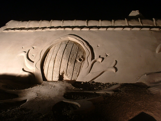 Sandskulptur (Haus)